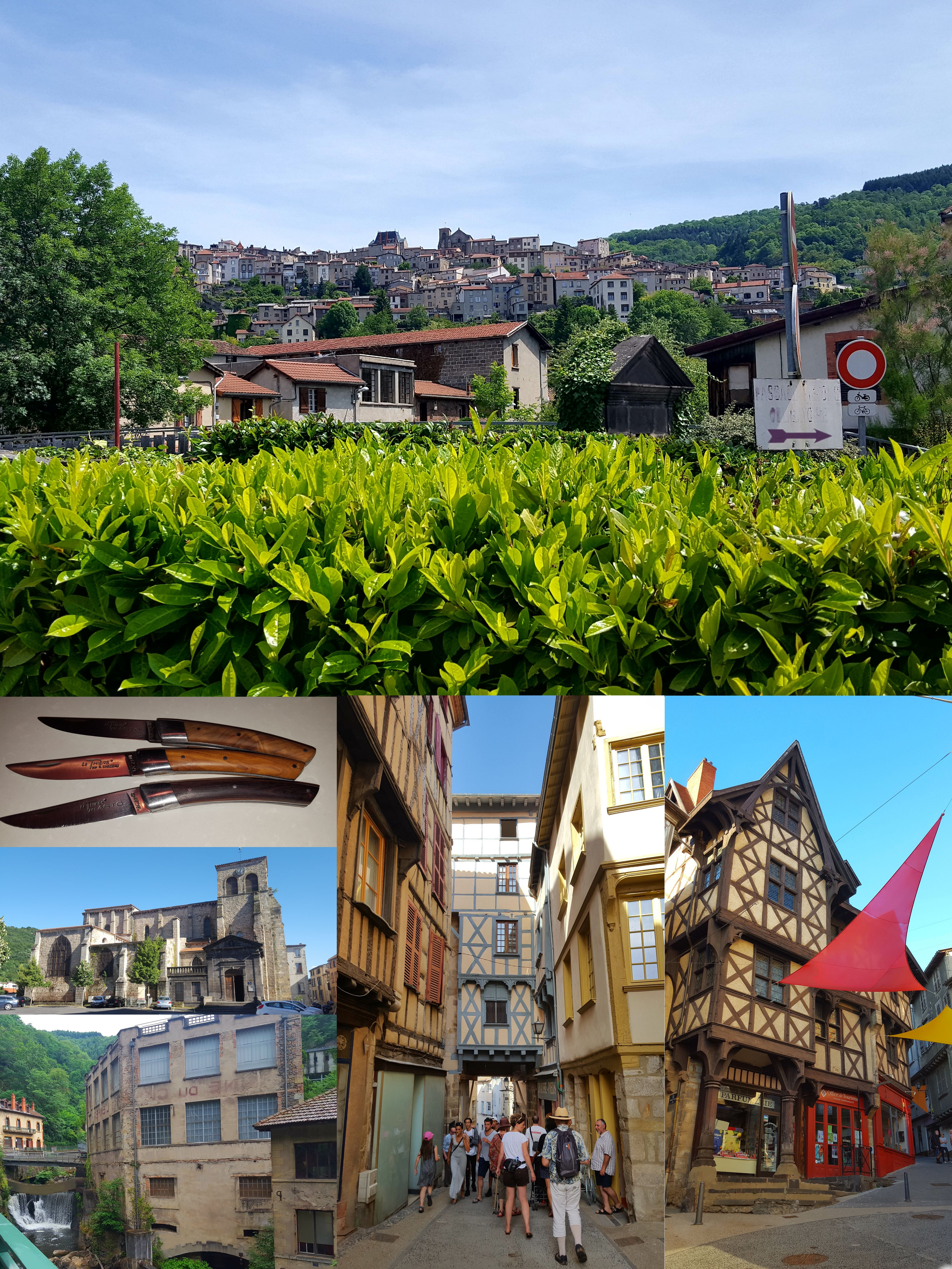 En haut : le centre historique de Thiers vu depuis le Pont du navire au Moûtier. En bas à droite : Le Château du Pirou. En bas au centre : La Pedde du coin des hasards. En bas à gauche : Le centre d'art du creux de l'enfer. Au milieu à gauche : L'église Saint-Genès de Thiers. En haut à gauche : des couteaux Le Thiers.